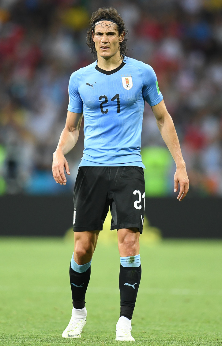 День, когда Роналду попрощался с ЧМ. Кавани и Суарес идут дальше